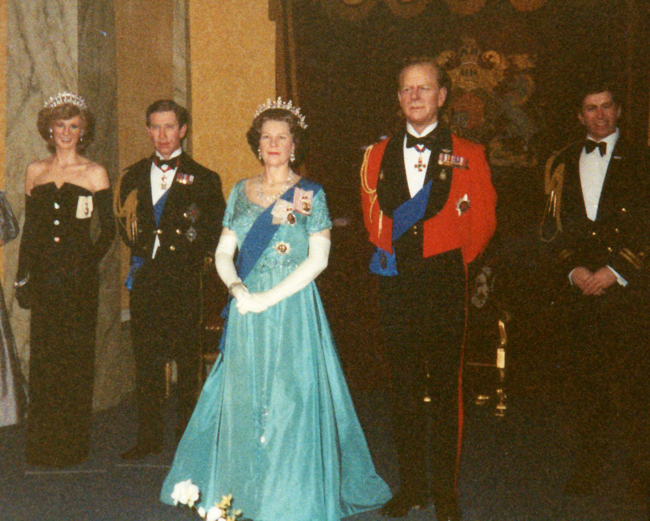 Statues de cire de la famille royale au Musée Tussaud de Londres en 1992.